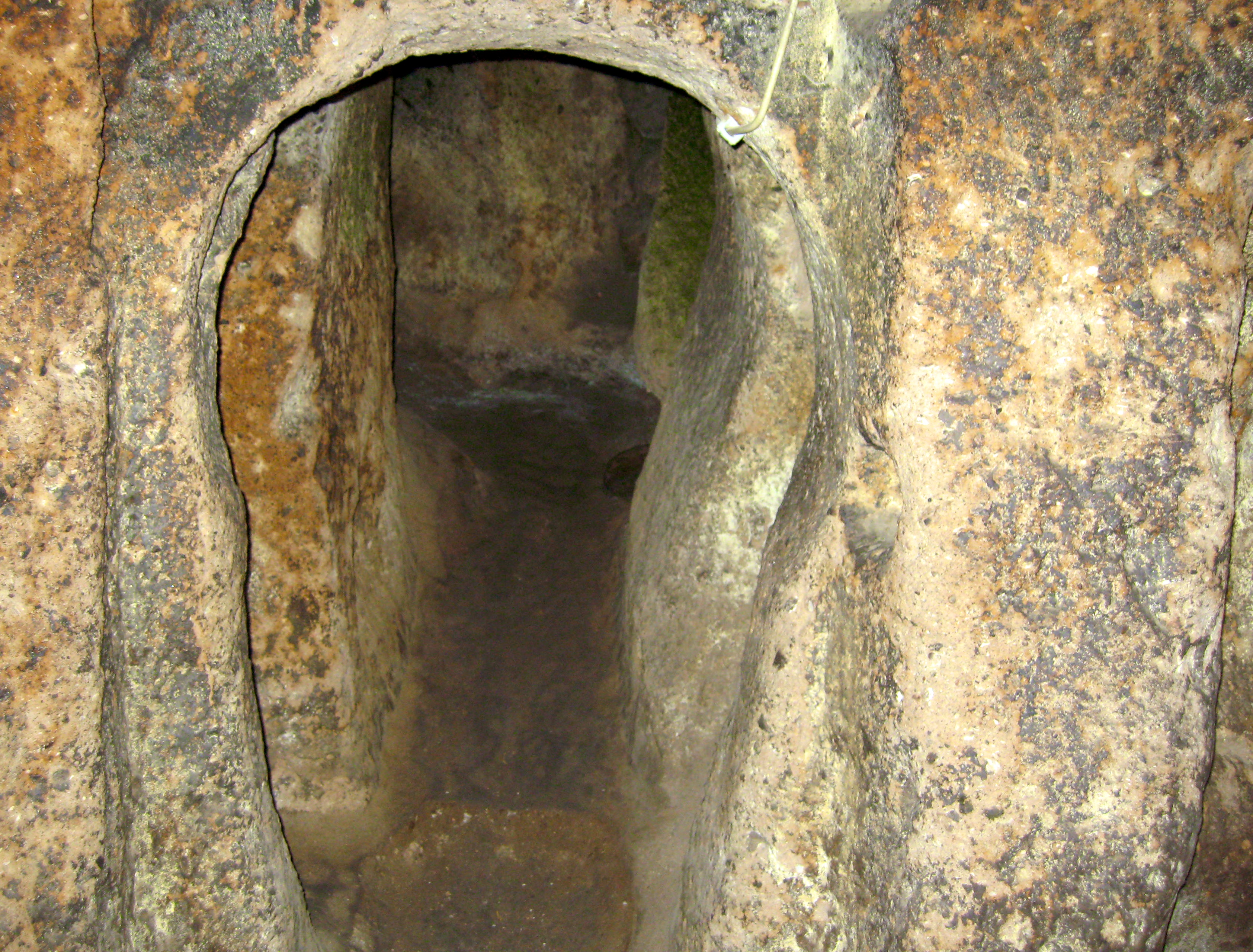 Kaymakli